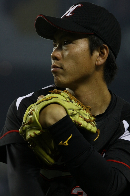 日本プロ野球 千葉ロッテマリーンズ 三木亮選手(内野手)